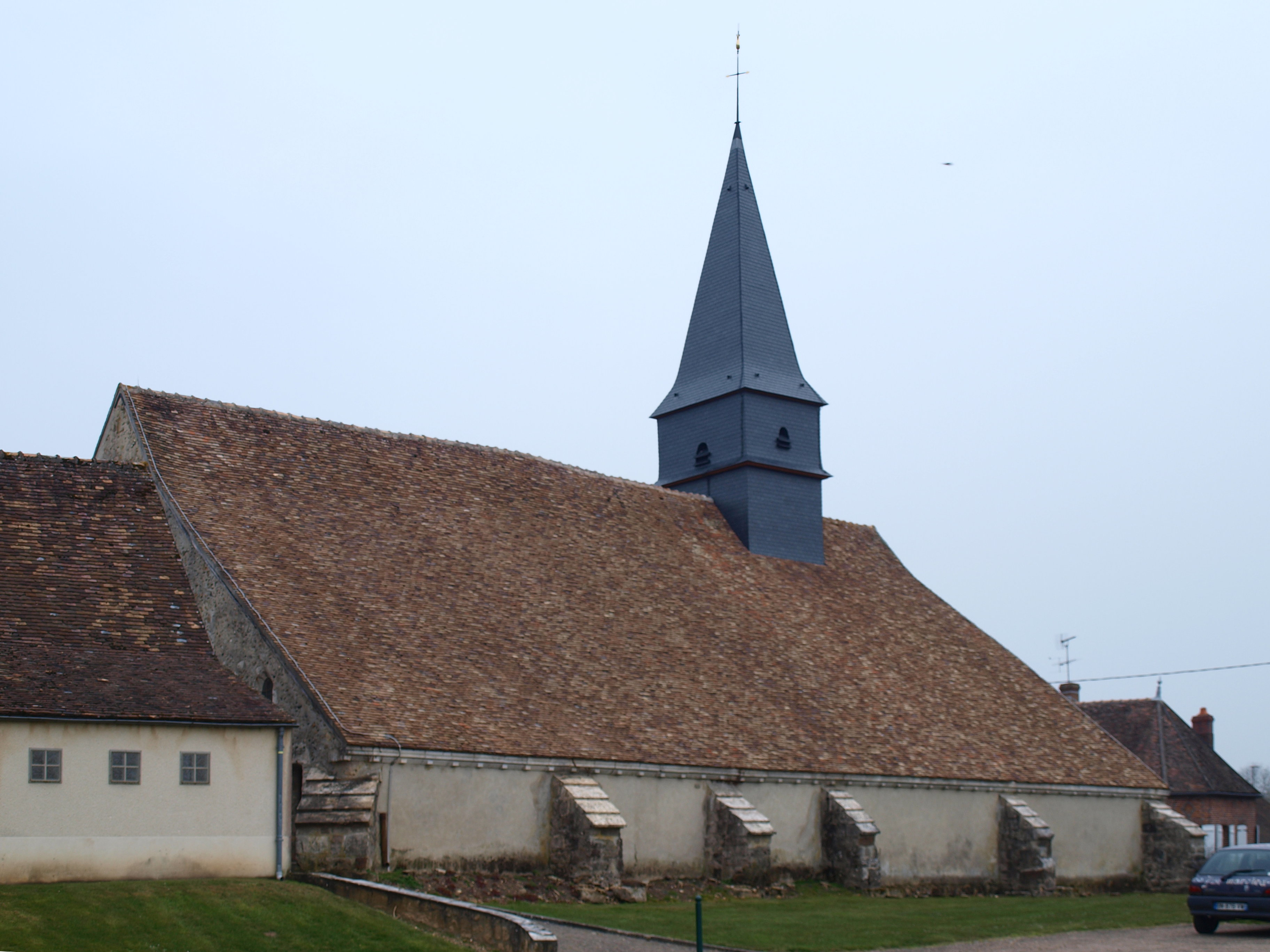 Bazoches-sur-le-Betz (Loiret, France) , Église Saint-Eutrope.